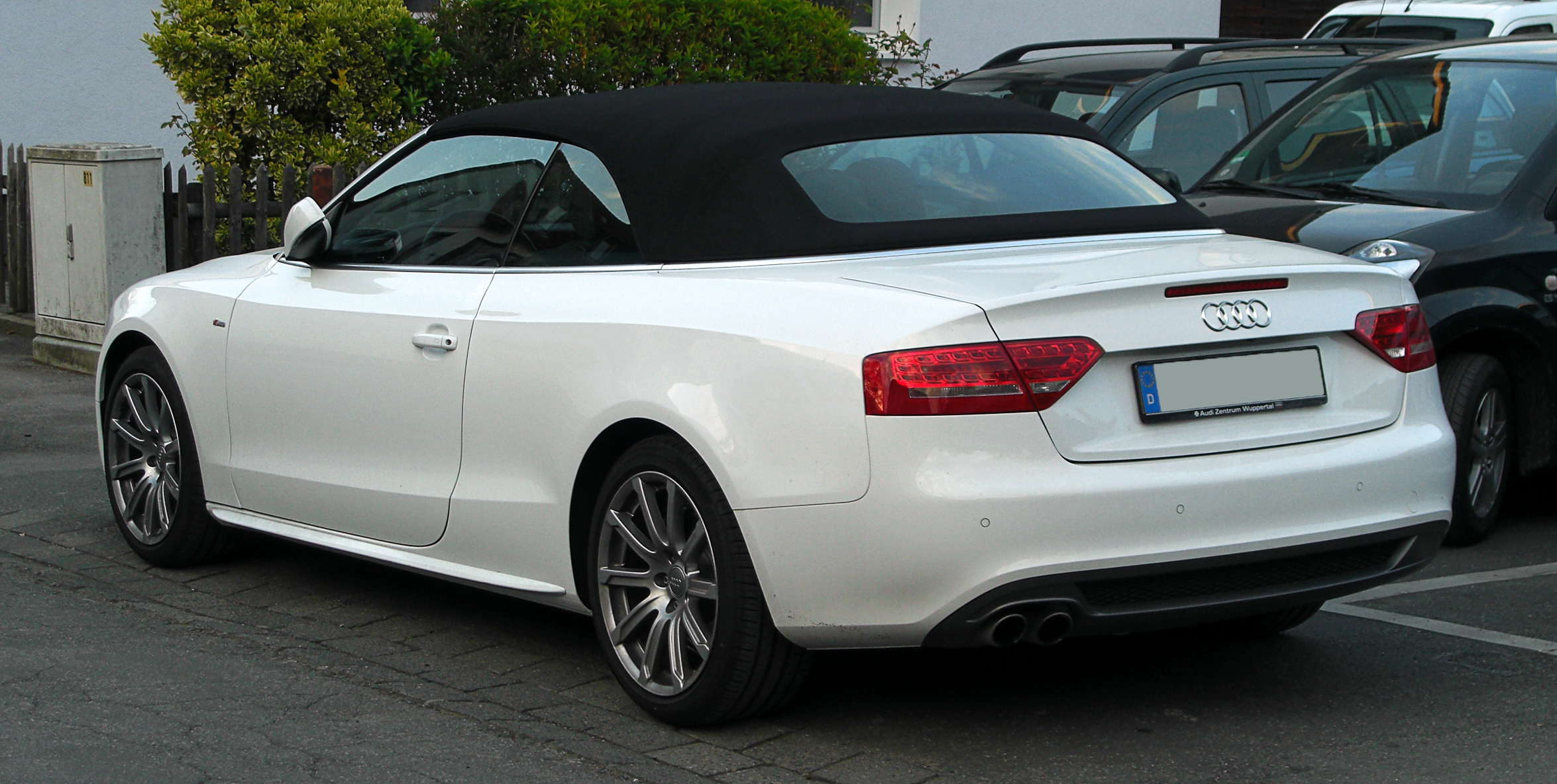 Audi A5 Cabriolet 1.8 TFSI S-line